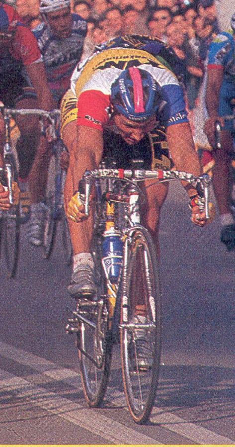 Jeroen Blijlevens (winnaar 1e etappe Ruta del Sol 1995)